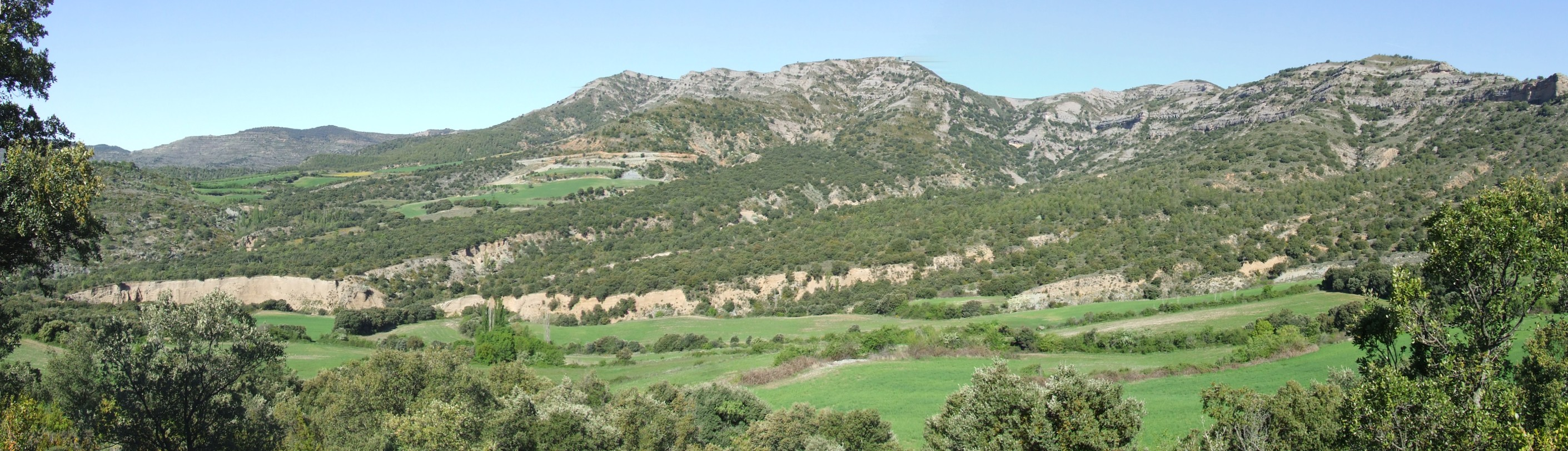 Panoràmica de Montibarri (Gurp de la Conca, Tremp, Pallars Jussà)